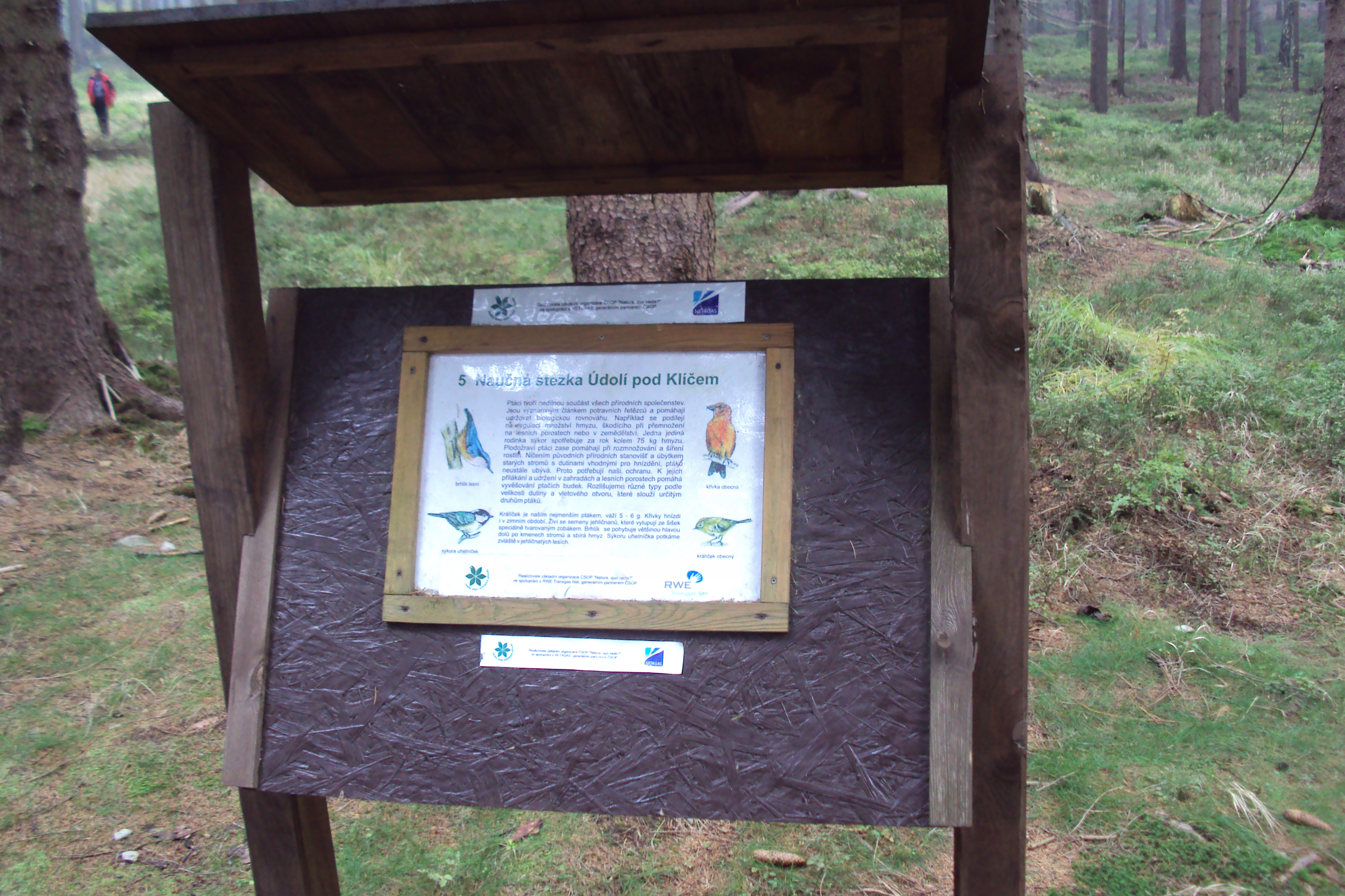 Naučná stezka Údolí pod Klíčem, Lužické hory